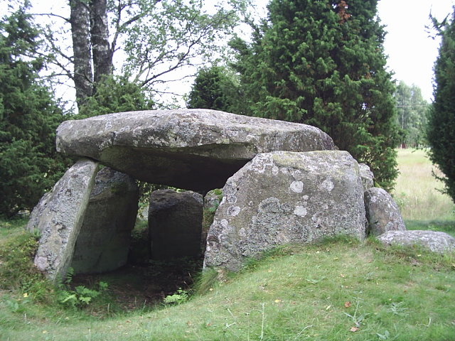 Gånggrift vid Massleberg i Skee socken, Strömstads kommun. Fotograferad 23/7 2004 av Tubaist.